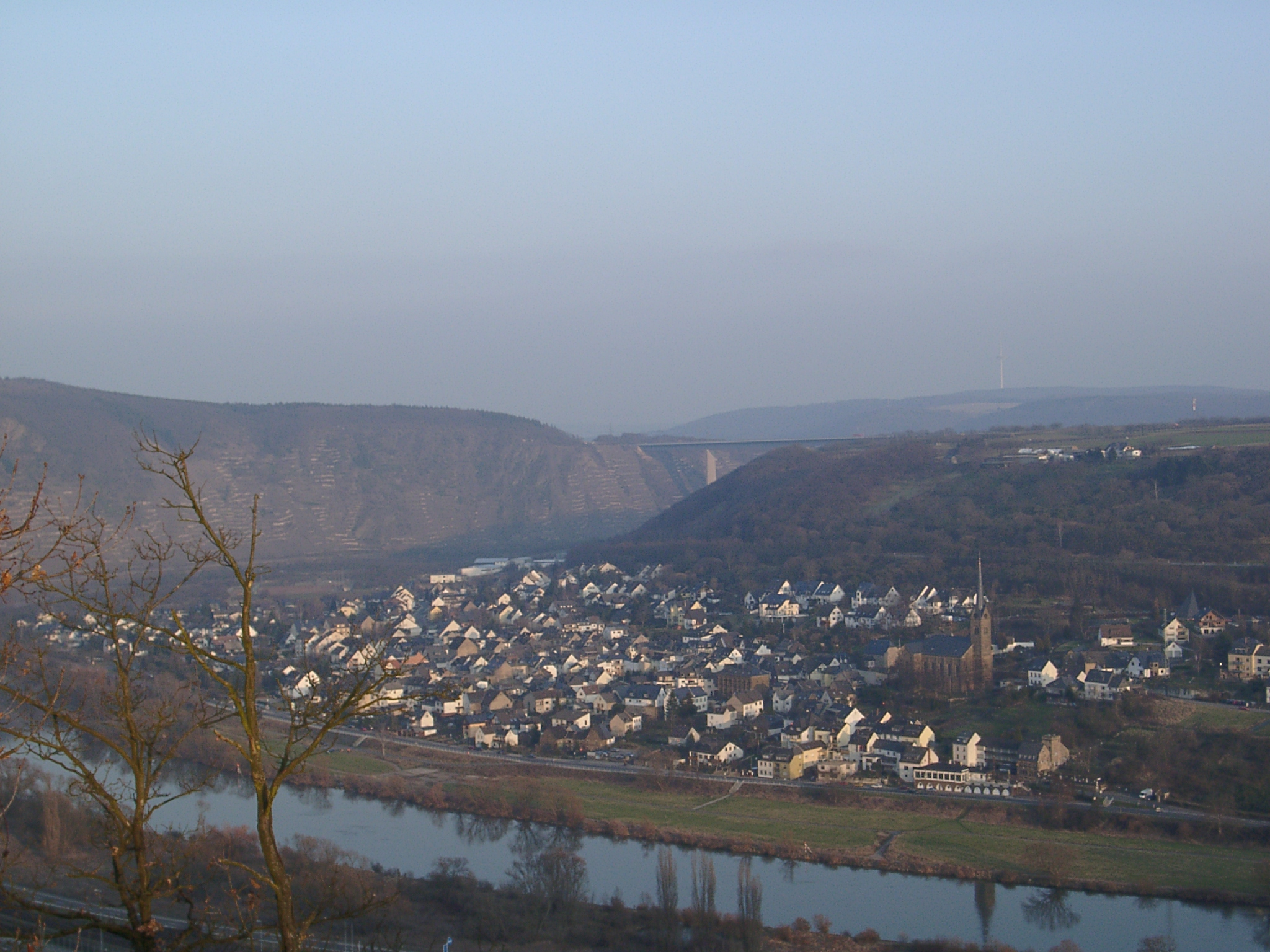 Dieblich an der Mosel (von der Oberburg Kobern aus) - selbst fotografiert (Klaus Graf) 6.2.2005 - Lizenz: CC-BY